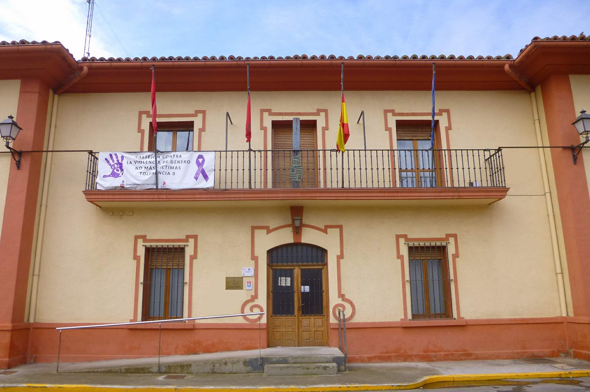 Ayuntamiento de Castejón (Navarra)